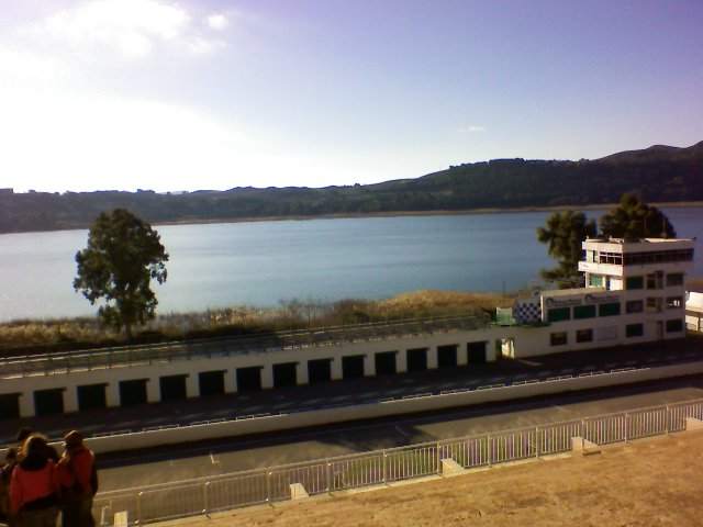 Pergusa Car Circuit and Lake-Autodromo e Lago di Pergusa